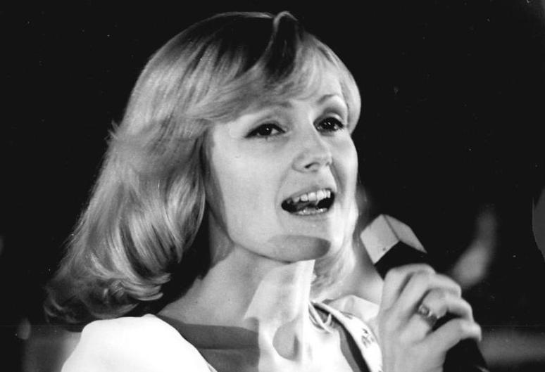 ADN-ZB Koard-28-4-76 Berlin: "Ball der Jugend" im Palast der Republik Beim Jugendtreff werden die jungen Ballgäste am 28.4.76 von Helena Vondtrackova musikalisch begrüßt. (Foto von der Generalprobe)